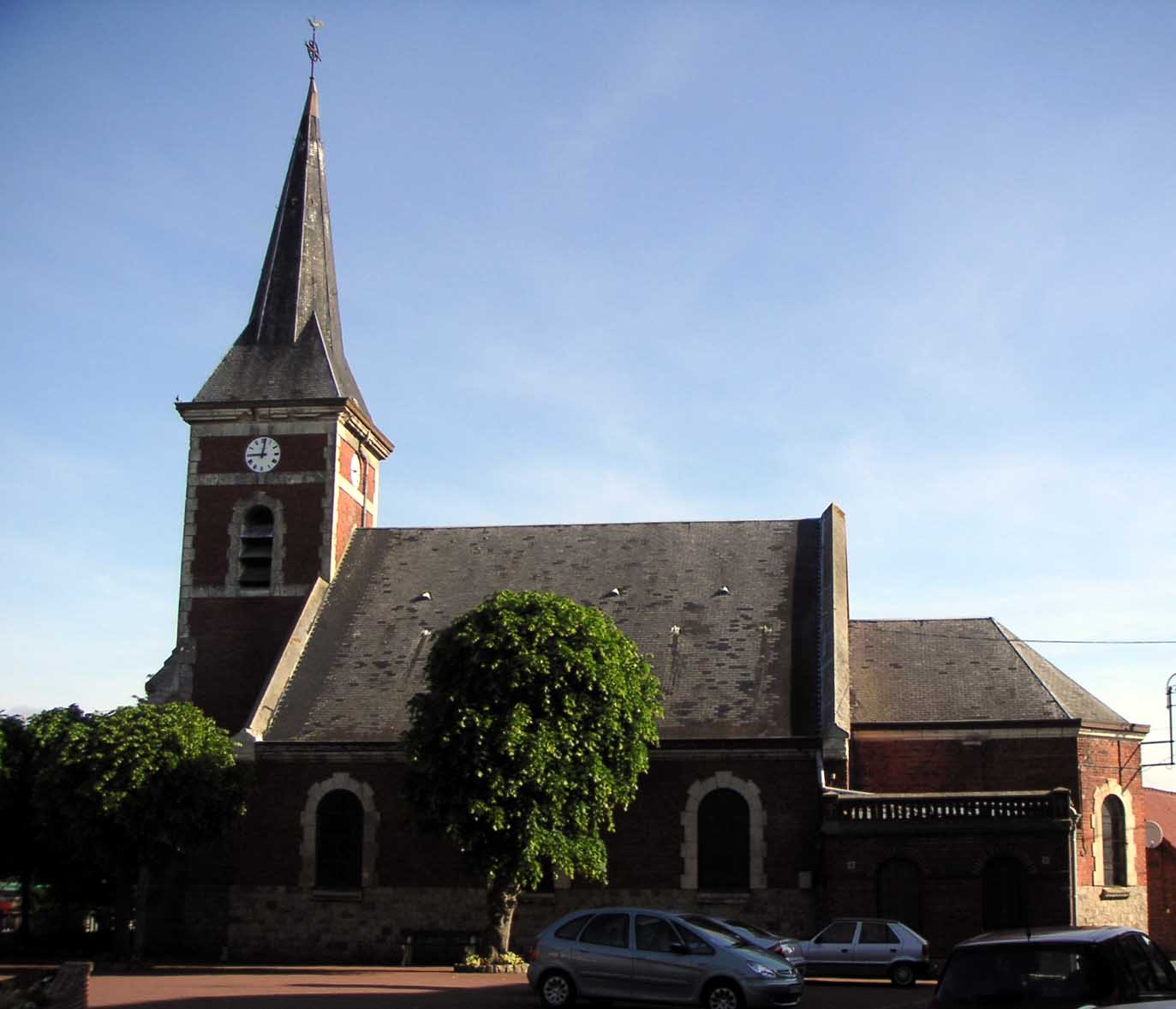 Vue de l'église de Palluel (Pas-de-Calais)